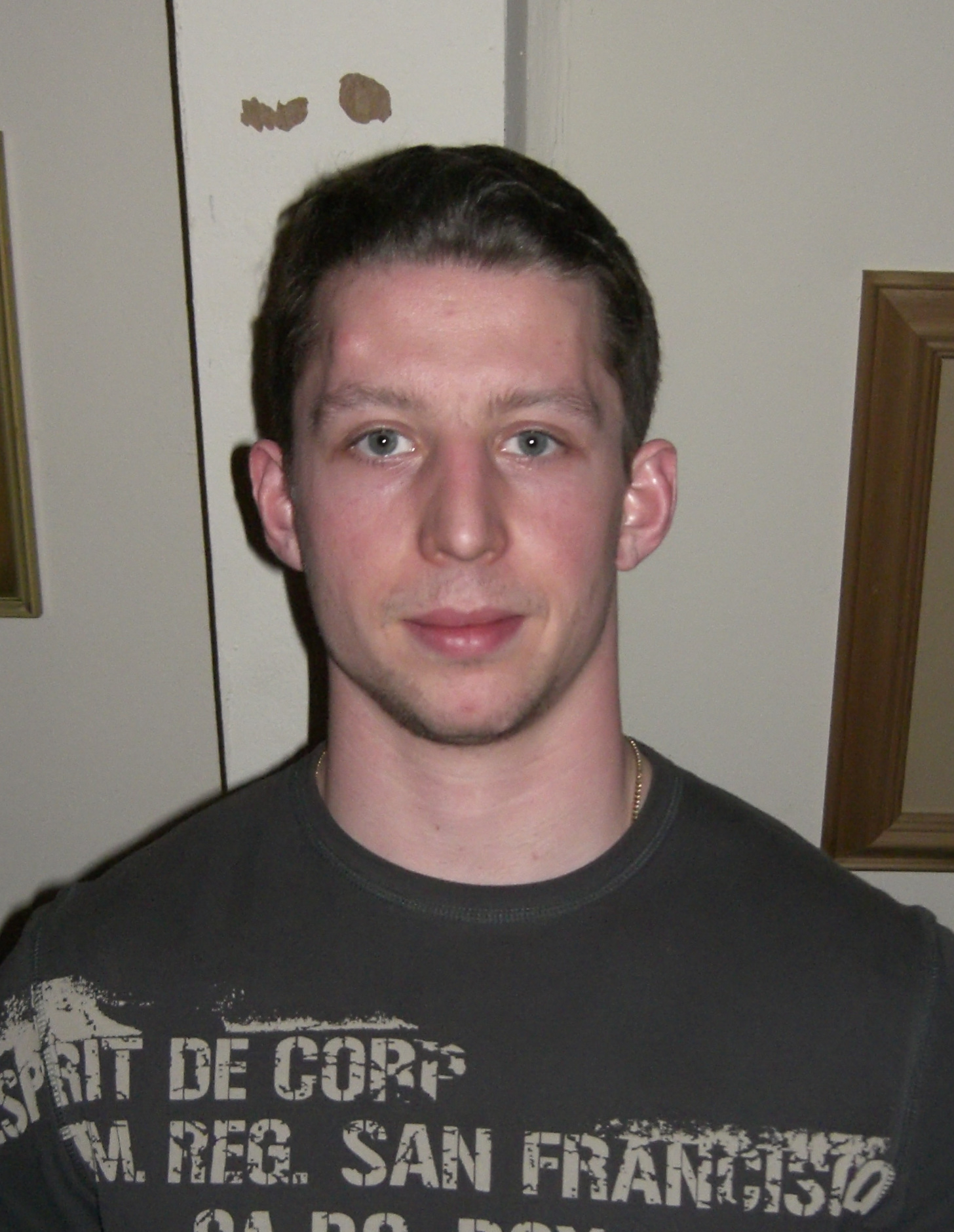 Michael Wolf, Eishockey-Spieler der Iserlohn Roosters selbst fotografiert